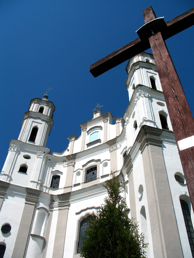 Беларуская (тарашкевіца): Лужкі